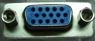 VGA connector